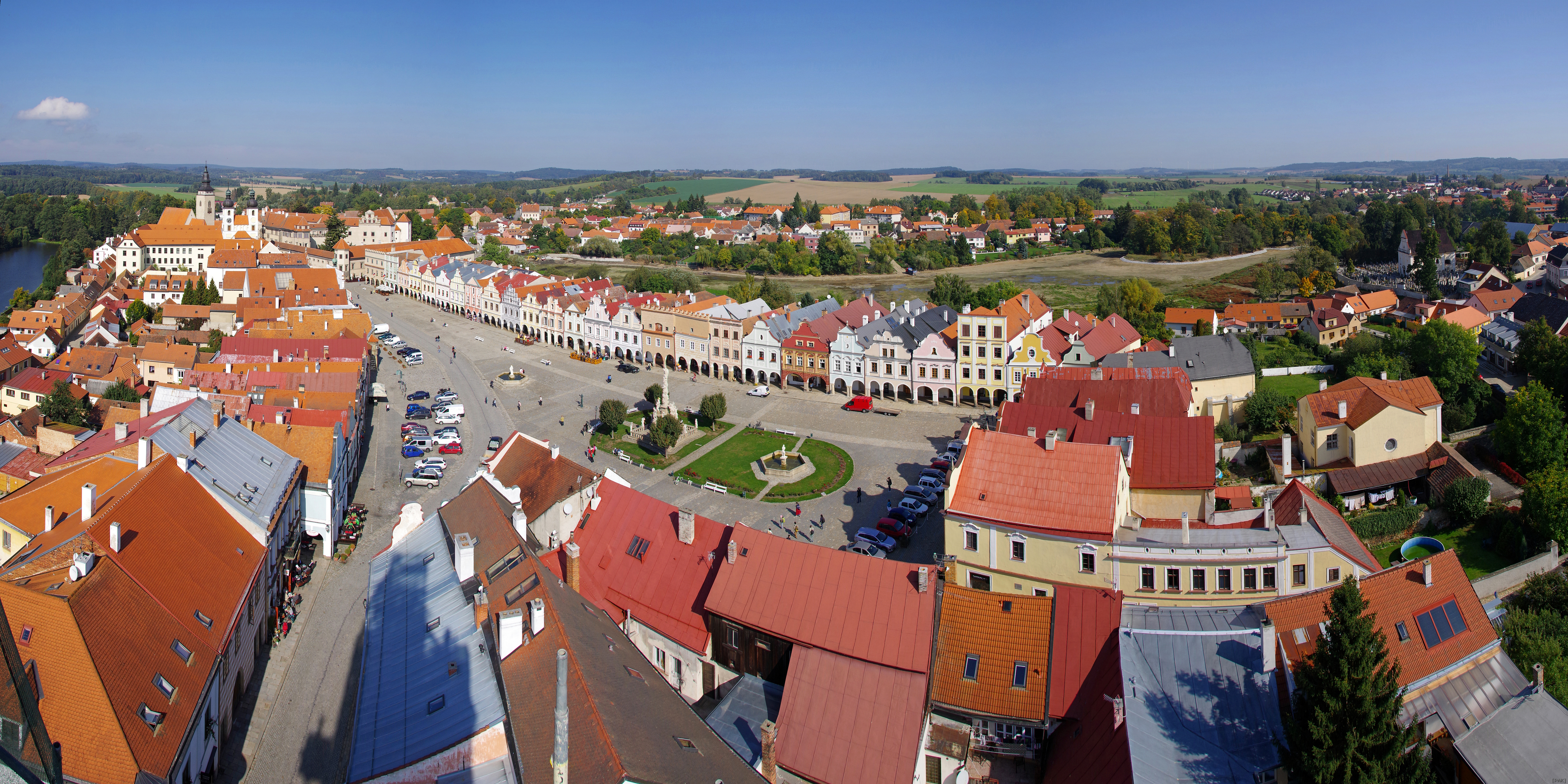 Pohled na telčské náměstí z rekonstruované střechy věže kostela sv. Ducha